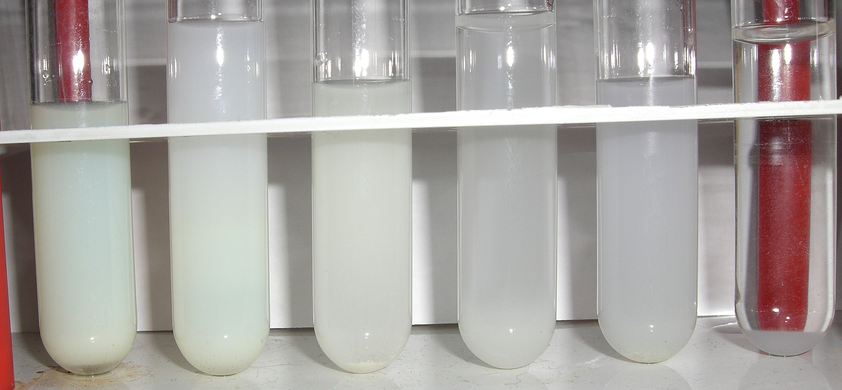 Halogenidfällung mit Silbernitrat